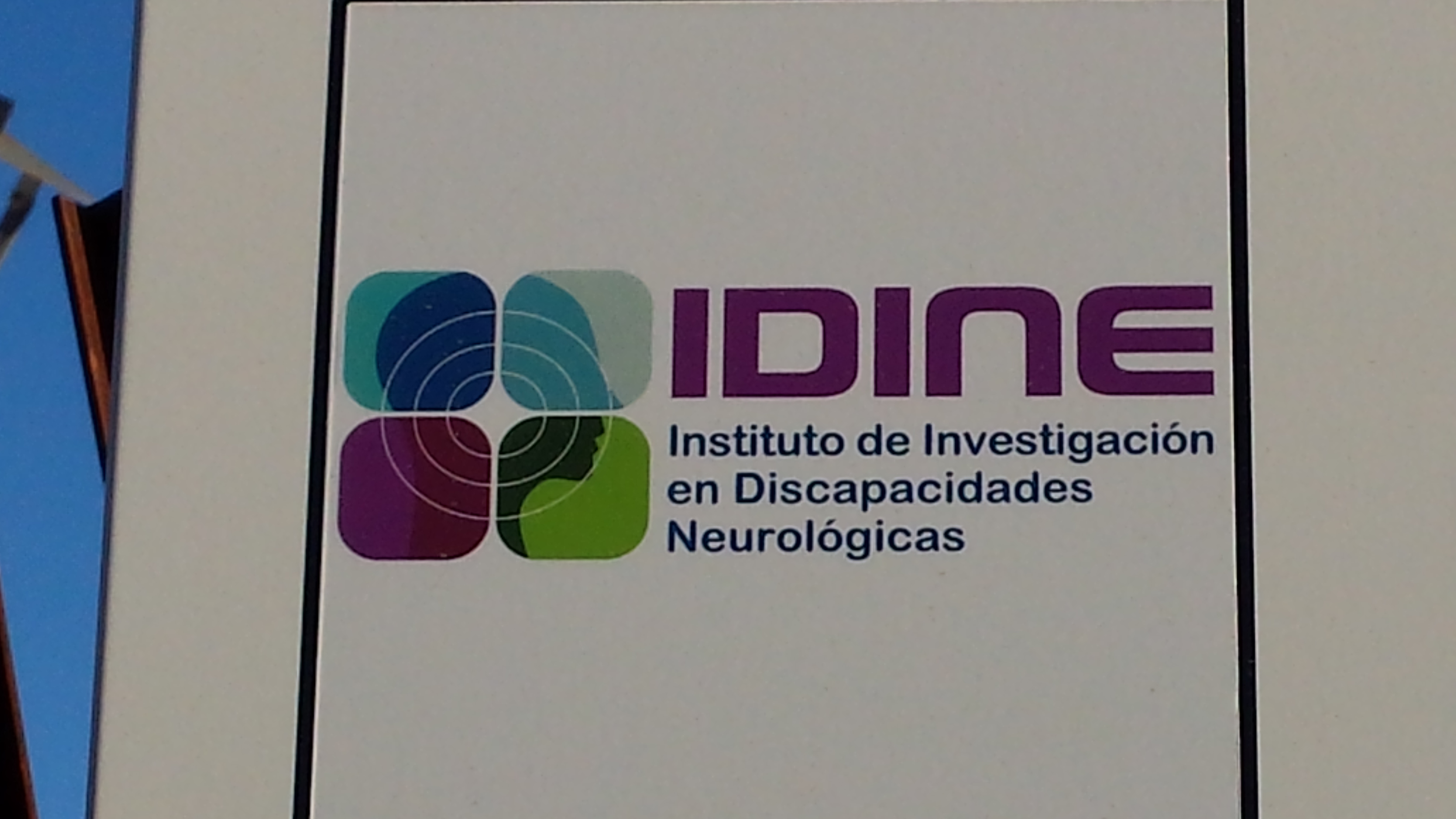 Logo del IDINE situado en una señal.